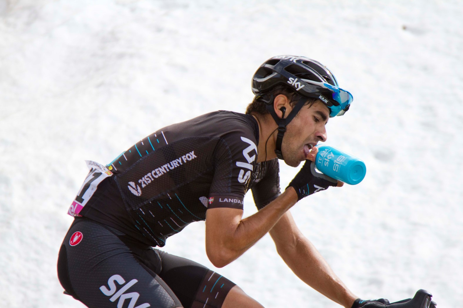 012 landa